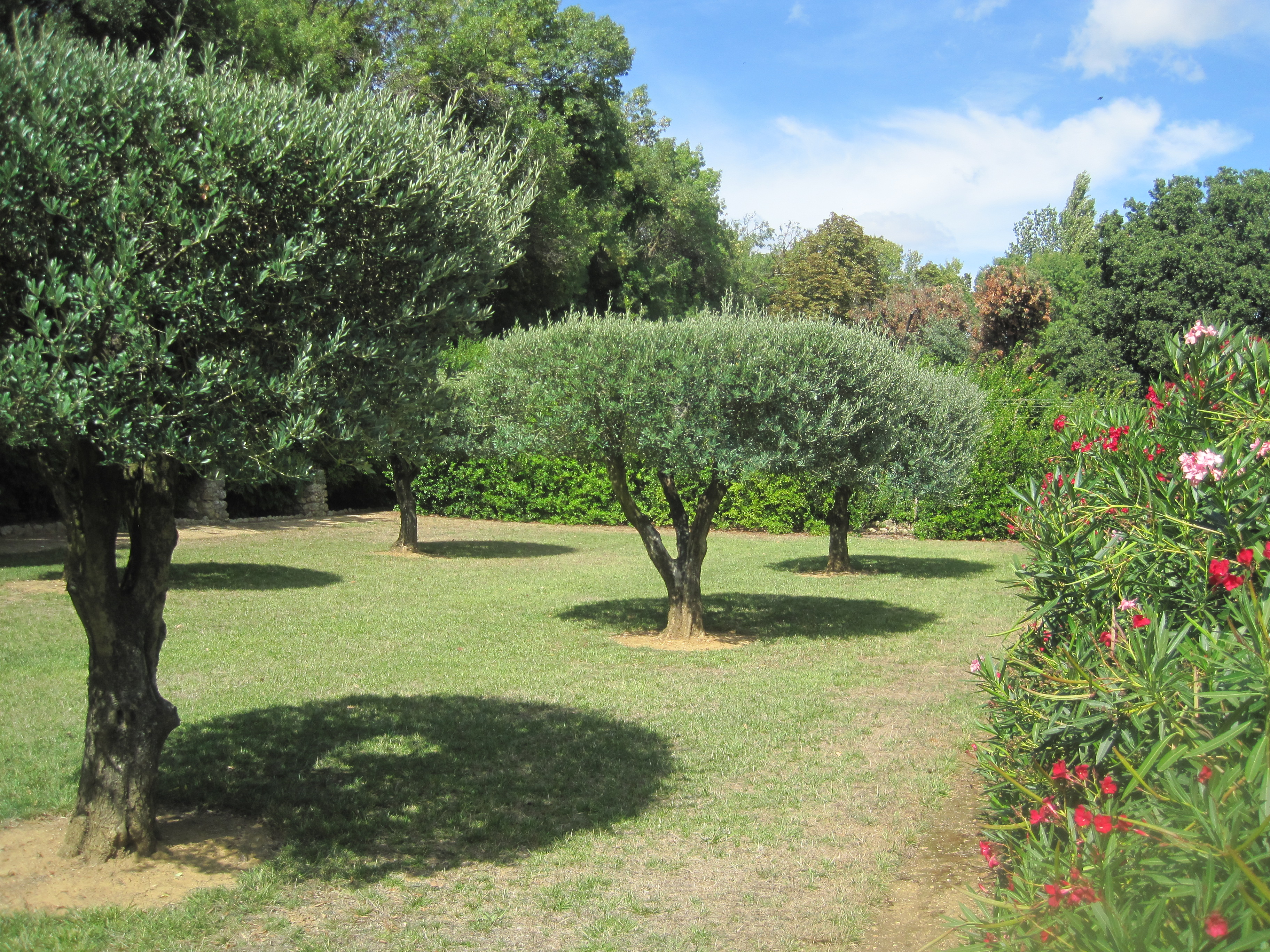 Château de Margon - Oliviers taillés en tambour